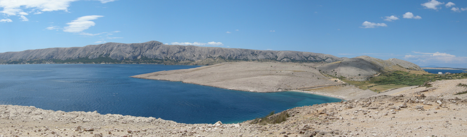 Plaża Ručica, ok. Metajny, Pag